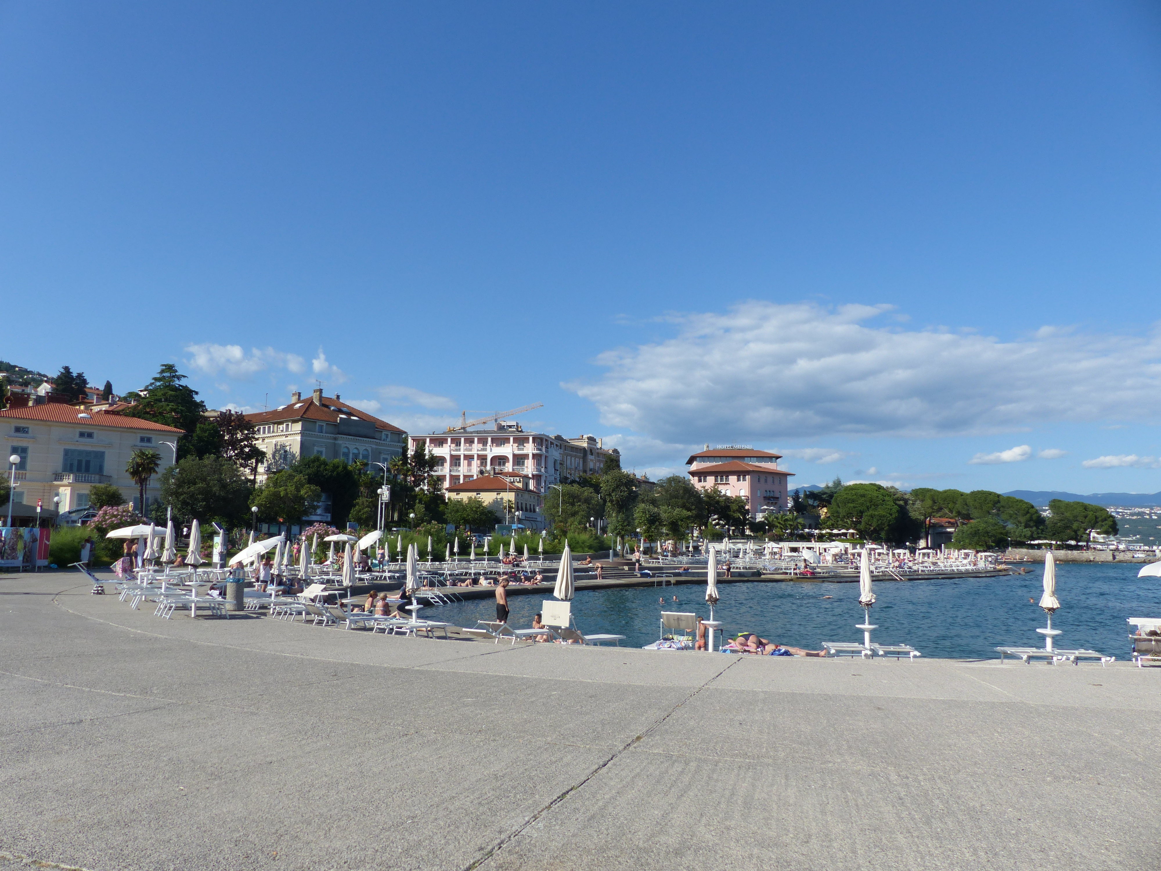 A felvétel 2016. június 28-án készült Abbáziában. A felvétel 2016. június 28-án készült Abbáziában. Az Osztrák-Magyar Monarchia polgárainak kedvelt nyaralóhelye. Sokan még a teleket is itt töltötték, mint Ferenc József a Monarchia császára. Ő a mai Kvarner Szállóban lakott. Budapesttől csupán 510 kilométer, ma is a mgyar utasok egyik kedvelt uticélja. A Lungomare Abbázia 12 km hosszú parti sétánya. A Magyar Királyság idejében építették: első része 1899-re készült el, míg a második 1911-re.